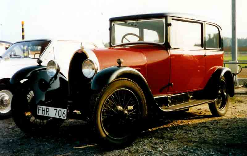 Bugatti Type 40 1927